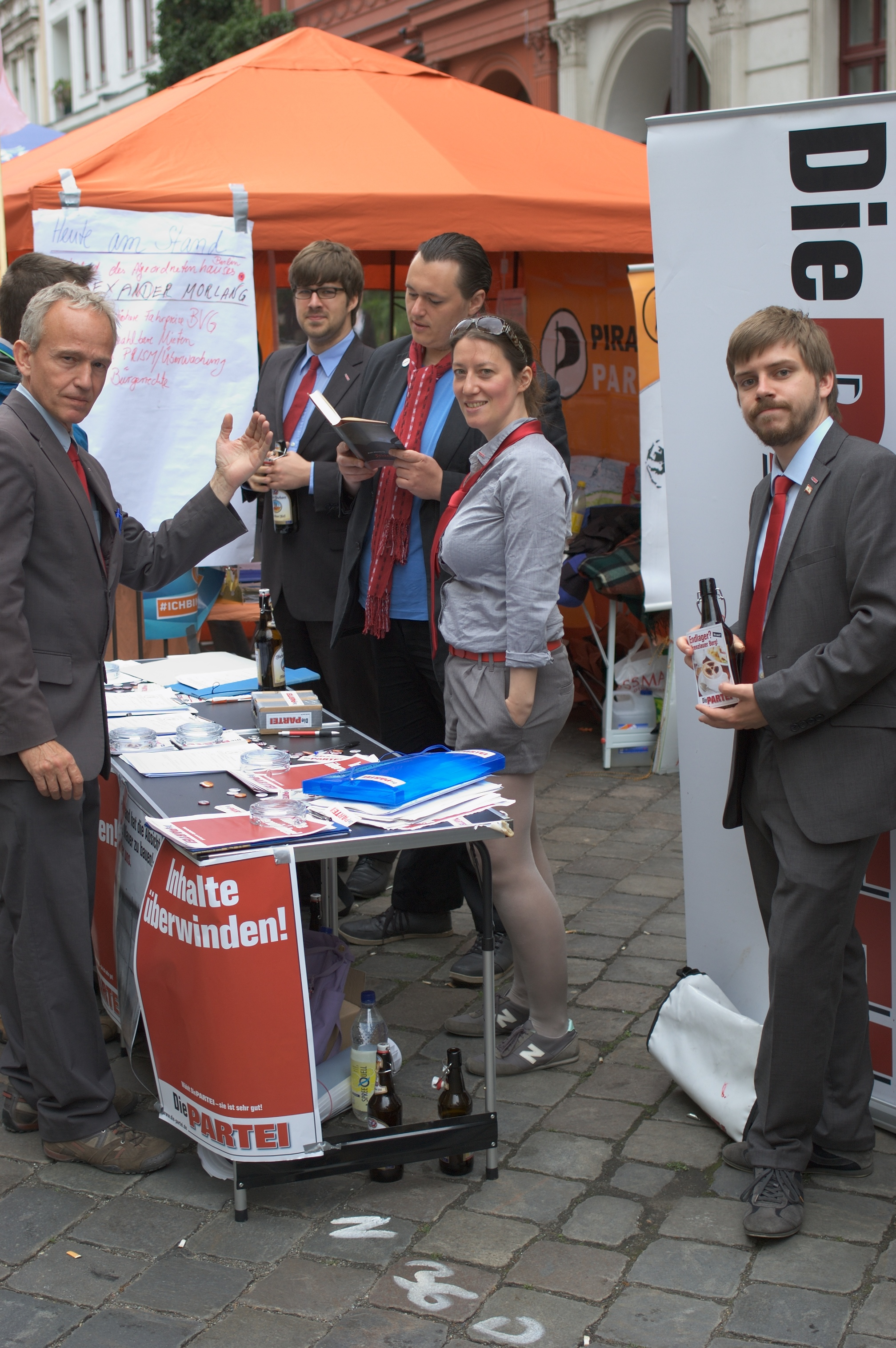 Infostand Partei für Arbeit, Rechtsstaat, Tierschutz, Elitenförderung und basisdemokratische Initiative, Inhalte überwinden - Die Partei